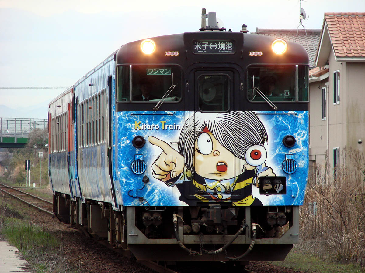 JR西日本 キハ40系（境線 鬼太郎列車）